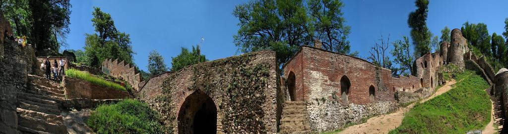 پانوراما فومن